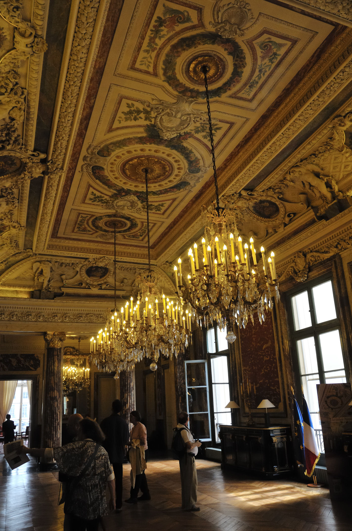 Hôtel de Bourvallais, siège du Ministère de la Justice, 11-13 place Vendôme, Paris, France : la Galerie Peyronnet Photo prise à l'occasion des journées européennes du patrimoine 2009